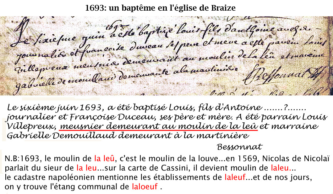 extrait des registres paroissiaux de Braize, attestant la présence très ancienne de ce moulin...et les différentes orthographes du lieudit